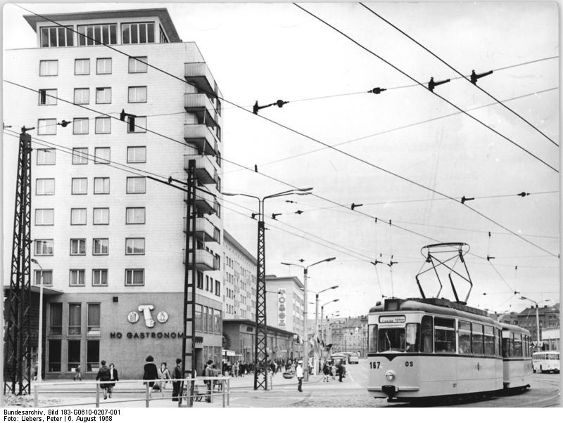 Gera, HO Gastronom, Satraßenbahn Zentralbild Liebers 6.8.68 Gera: Neugestaltung des Stadtzentrums der Bezirkshauptstadt Auf dem Platz der Republik. Hier deutet sich die städtebauliche Entwicklung der ostthüringischen Bezirksmetropole an der Weißen Elster bereits an. Im April dieses Jahres beschlossen die Stadtverordneten nunmehr, die Rekonstruktion im historischen Altstadtkern fortzusetzen.